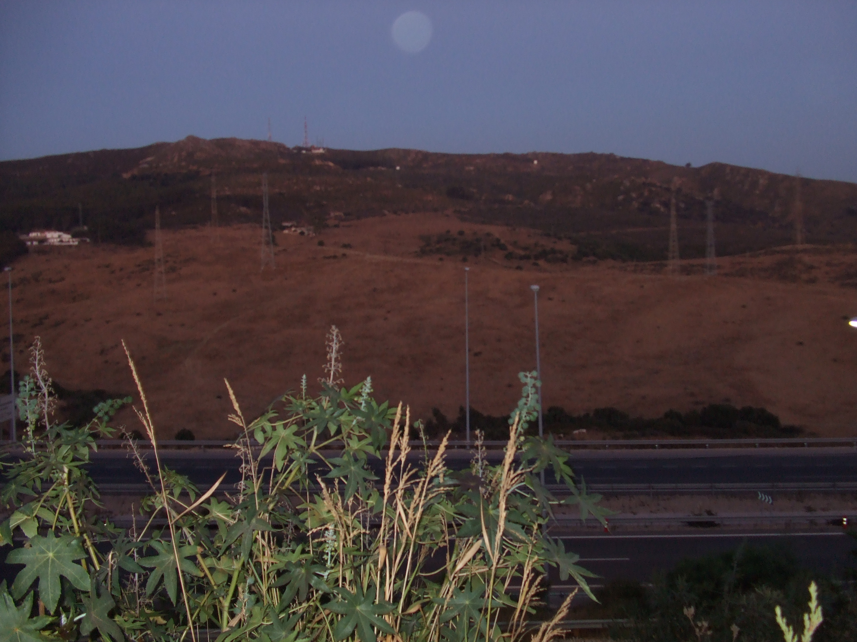 Sierra Carbonera, límite natural de los términos municipales de San Roque y La Línea de la Concepción.